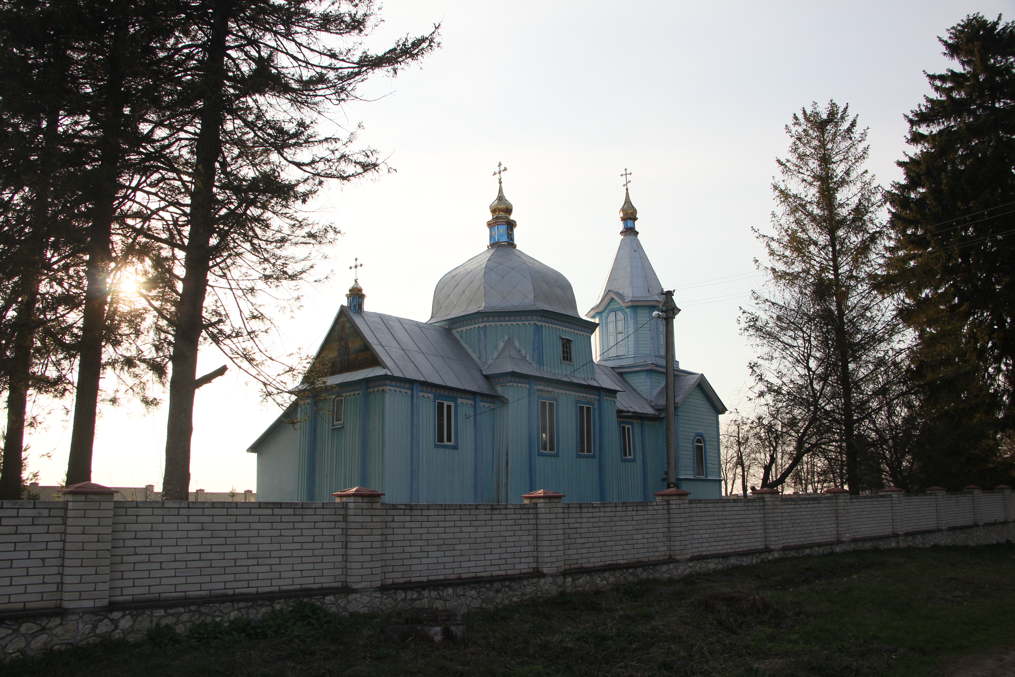 Дерев'яна церква в селі Москалівка Лановецького району, Тернопільської області